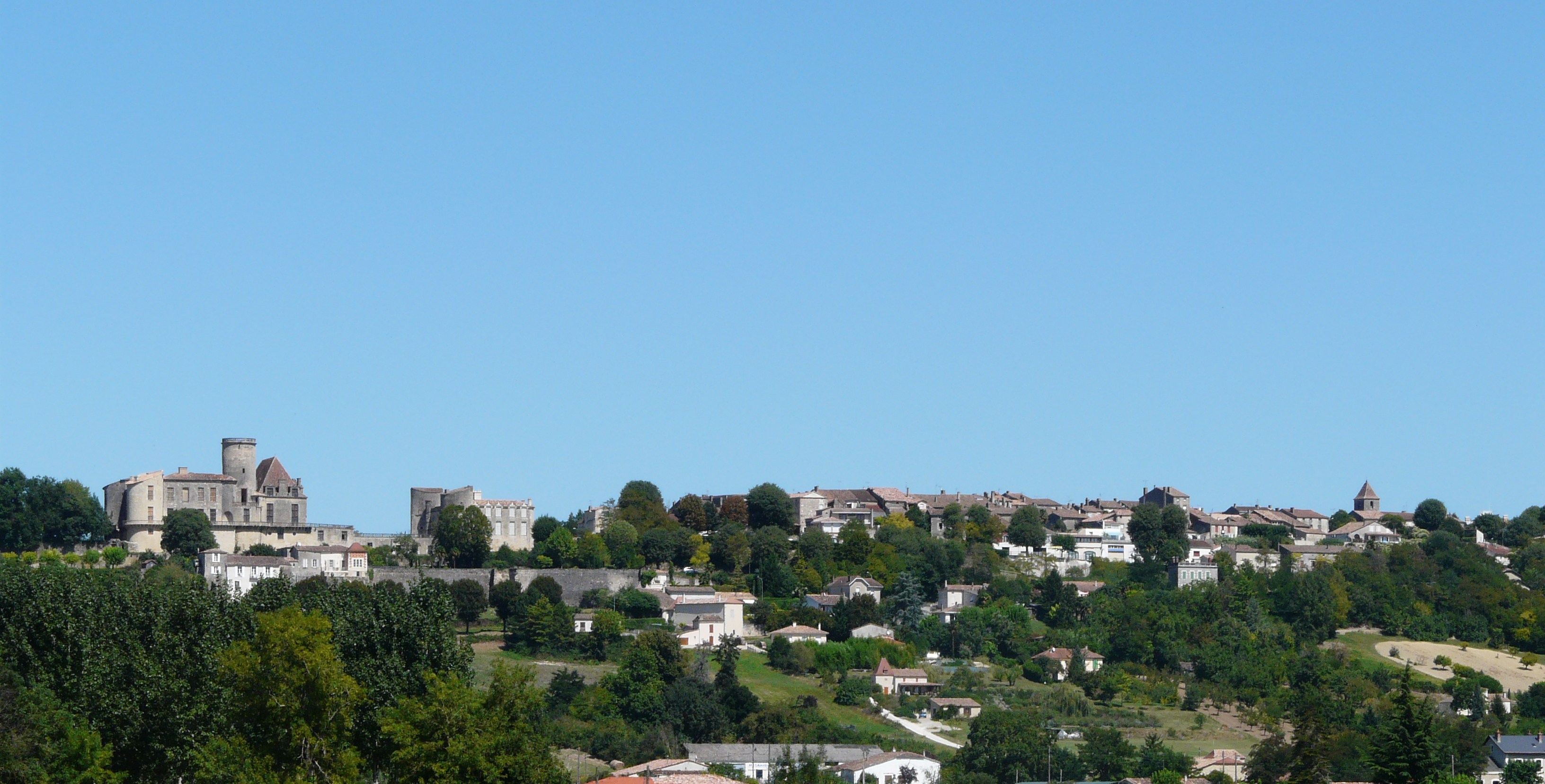 Duras (vue prise depuis le sud-ouest), Lot-et-Garonne, France